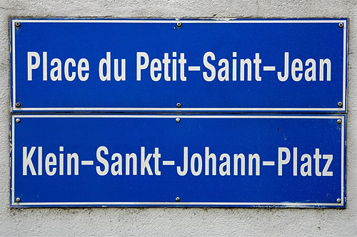 Fribourg / Freiburg: Zweisprachigkeit